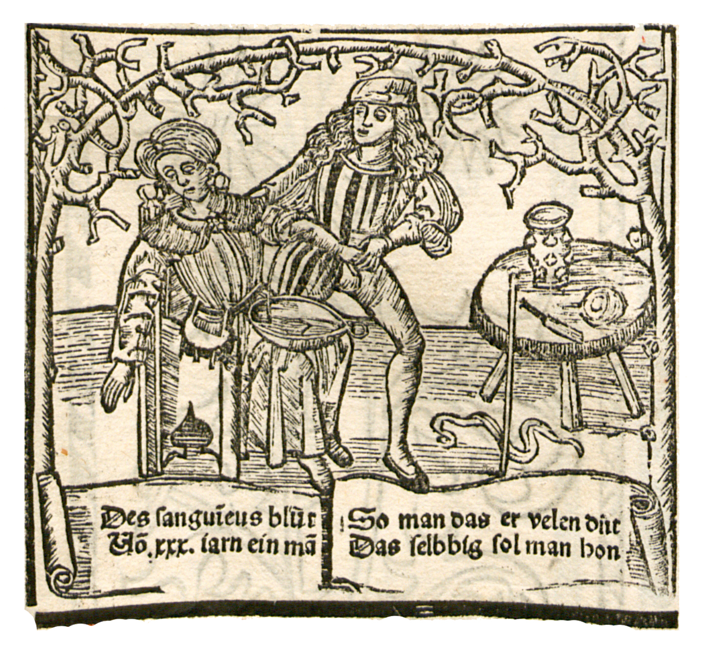 Abbildung zum Kapitel "Menschen Blut"